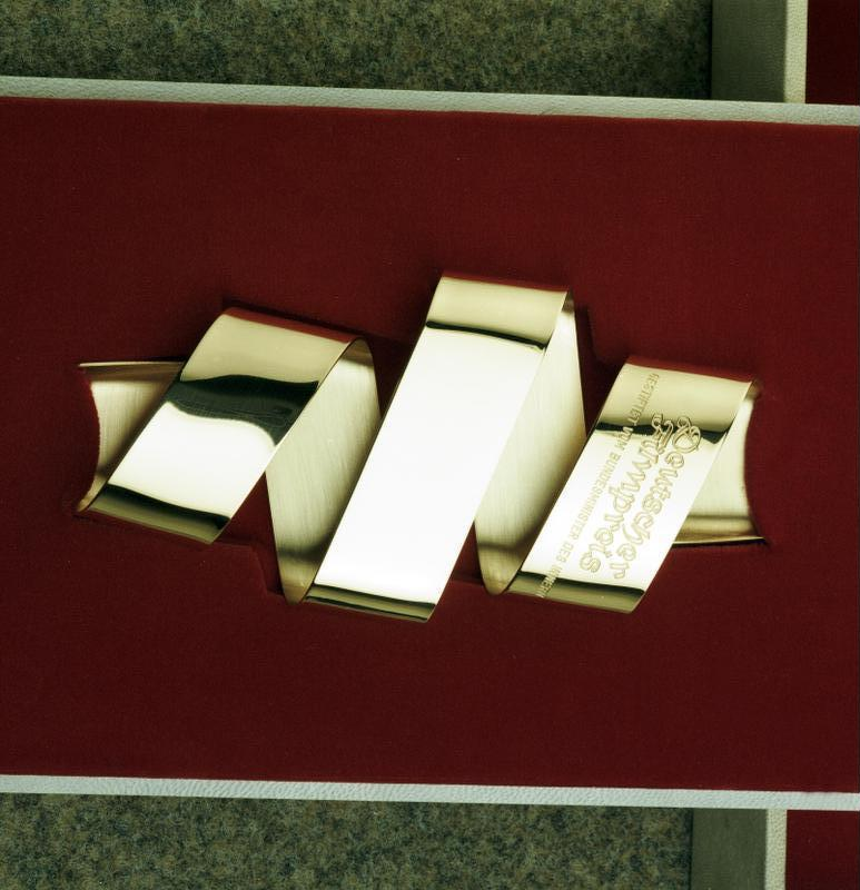 5.5.1989 Das "Goldene Filmband" Deutscher Filmpreis) gestiftet vom Bundesministerium des Innern